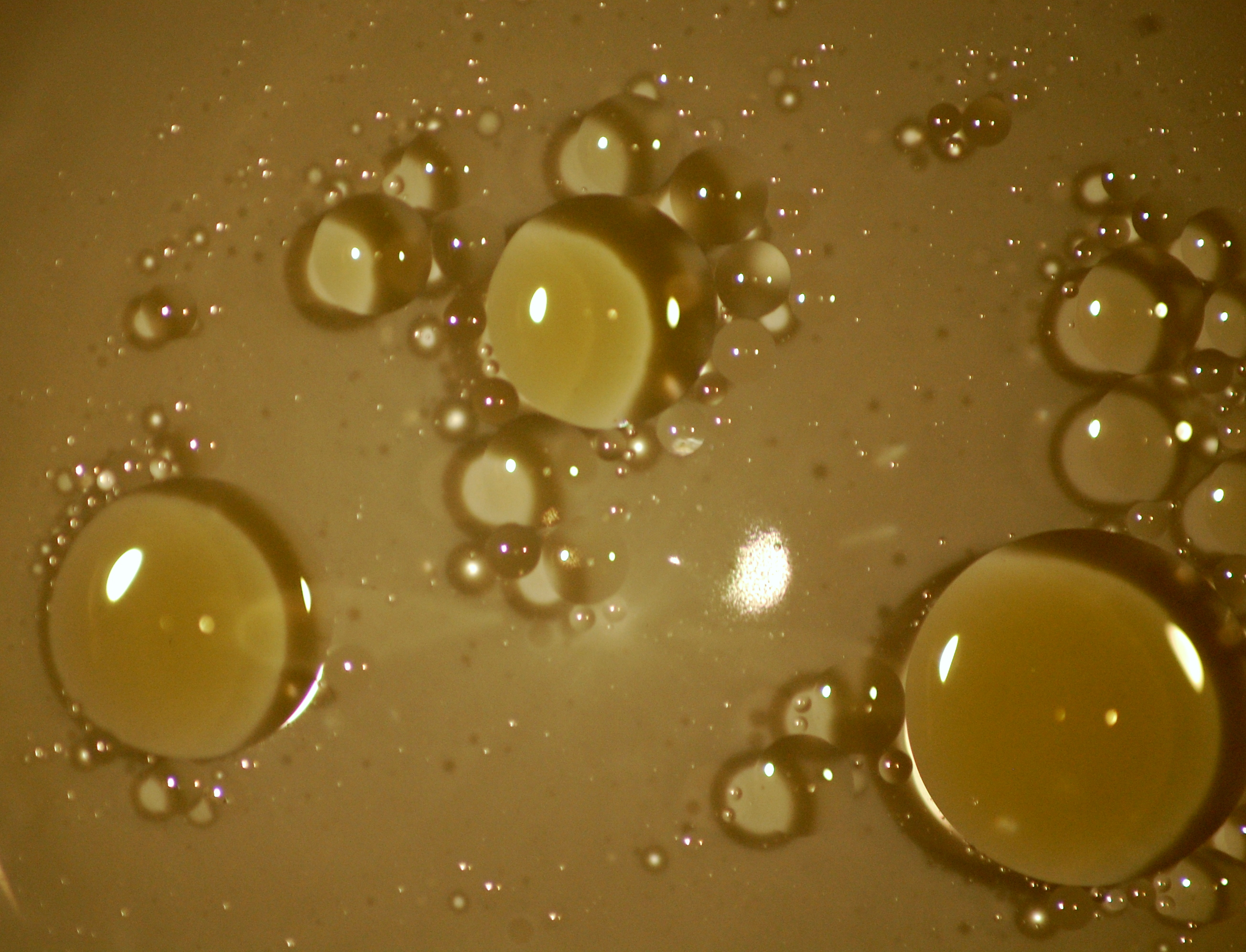 oli i aigua